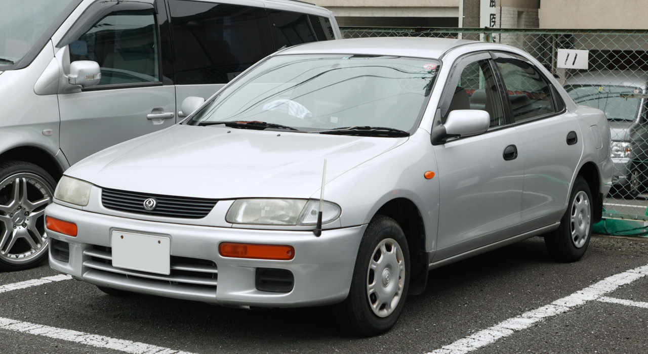 Mazda Familia, eighth generation.